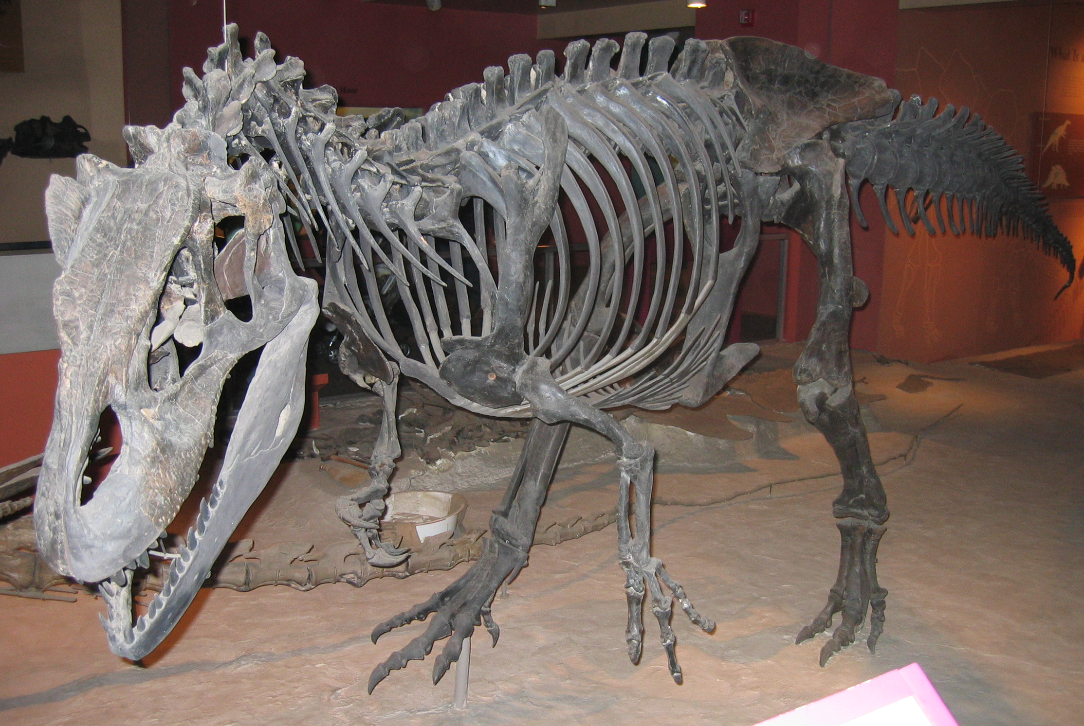 Allosaurus pounces